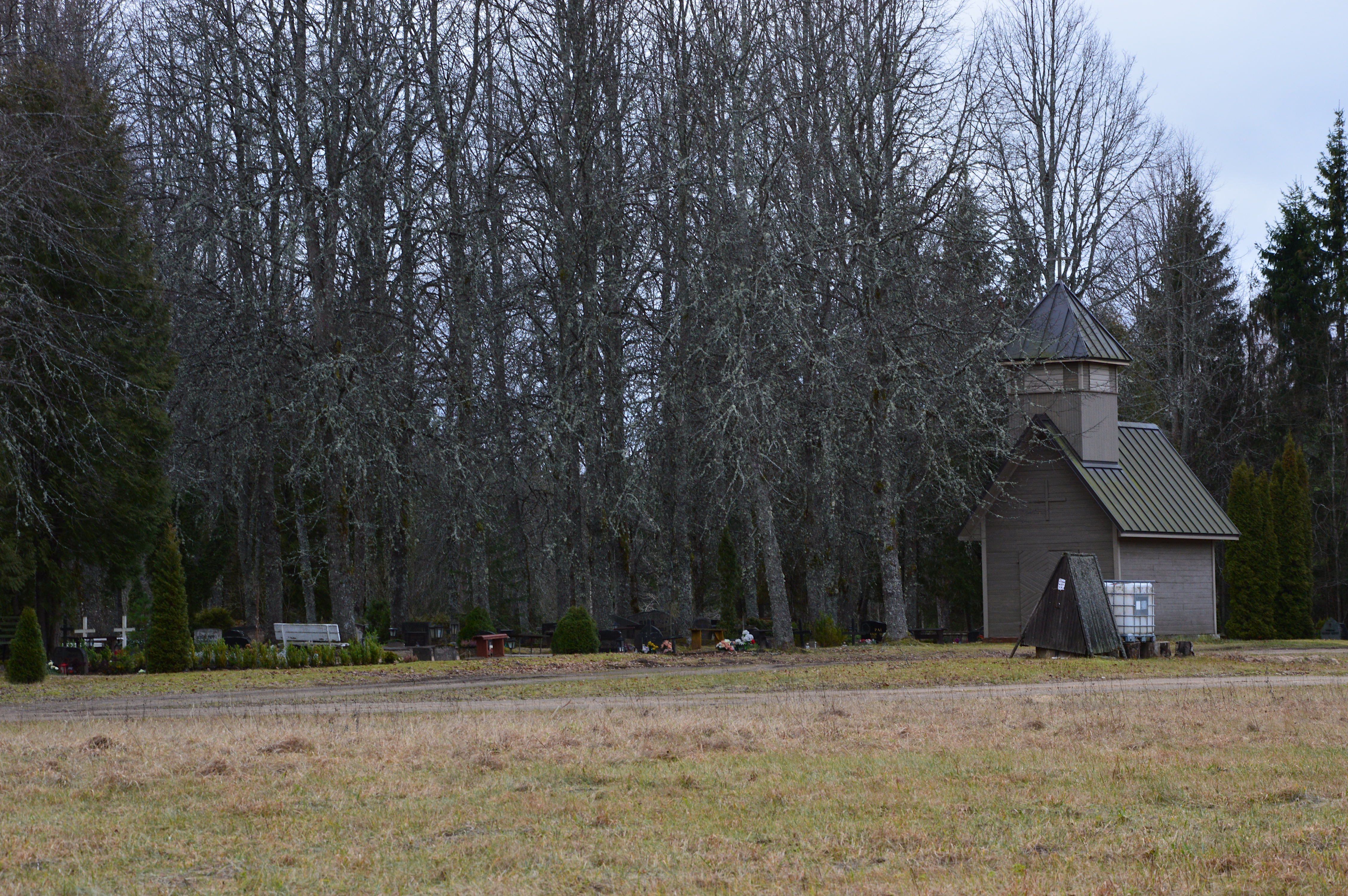 Misso kalmistu ja kabel